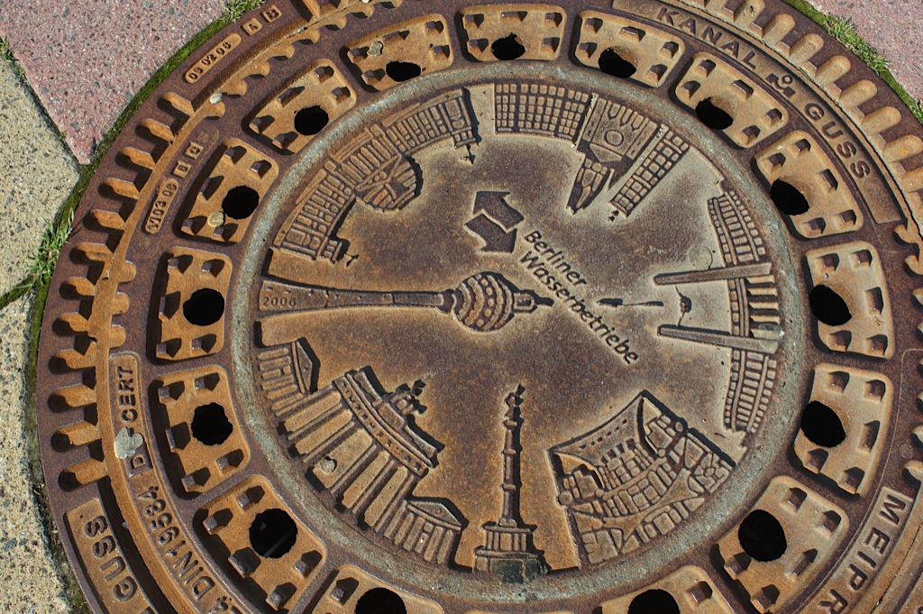 Berlingo estolderia (xehetasuna). Berlingo monumetu guztiak biltzen ditu.